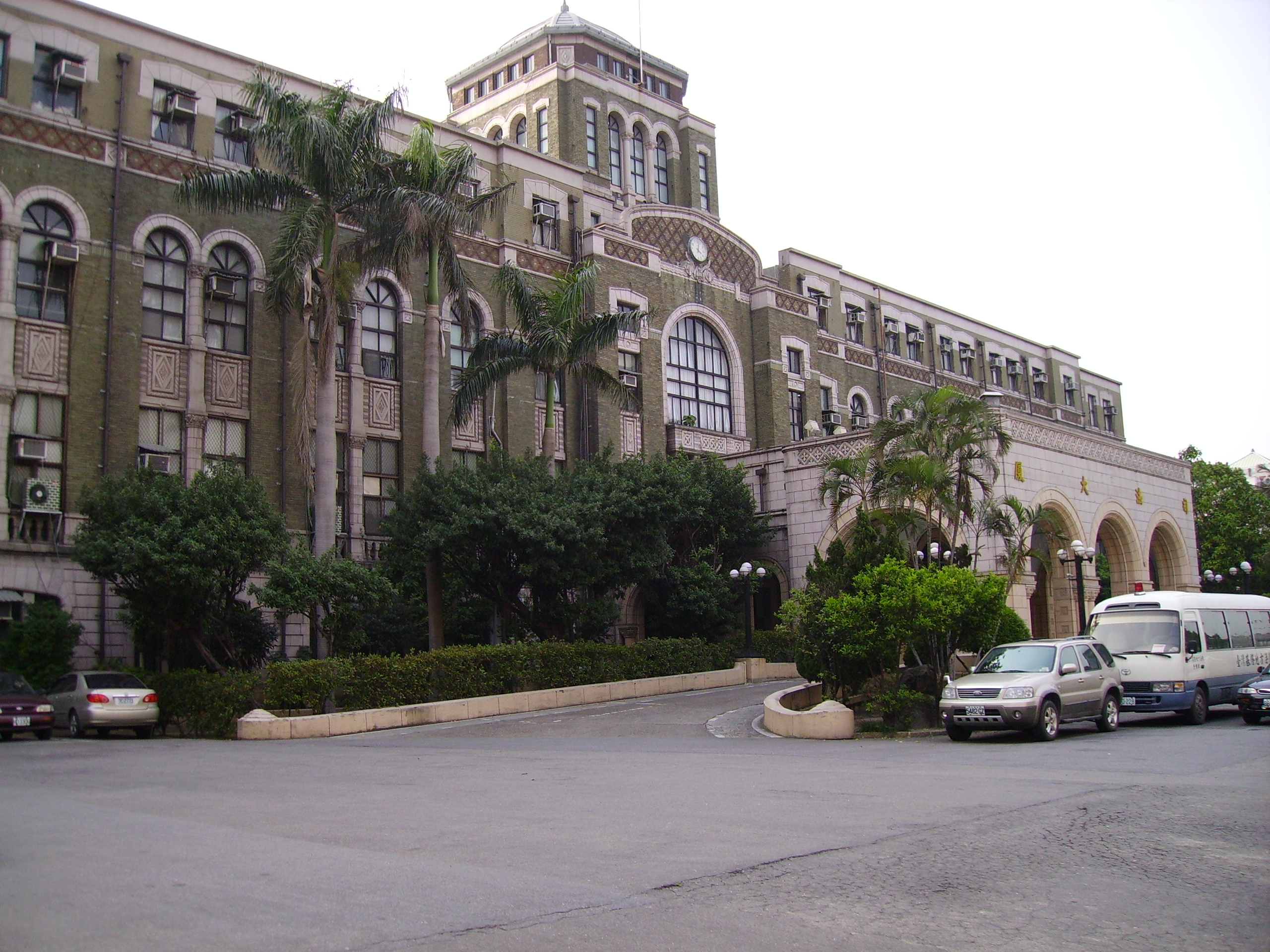 司法大廈(2006.04) Bân-lâm-gú: Su-huat Tāi-hā(2006.04)